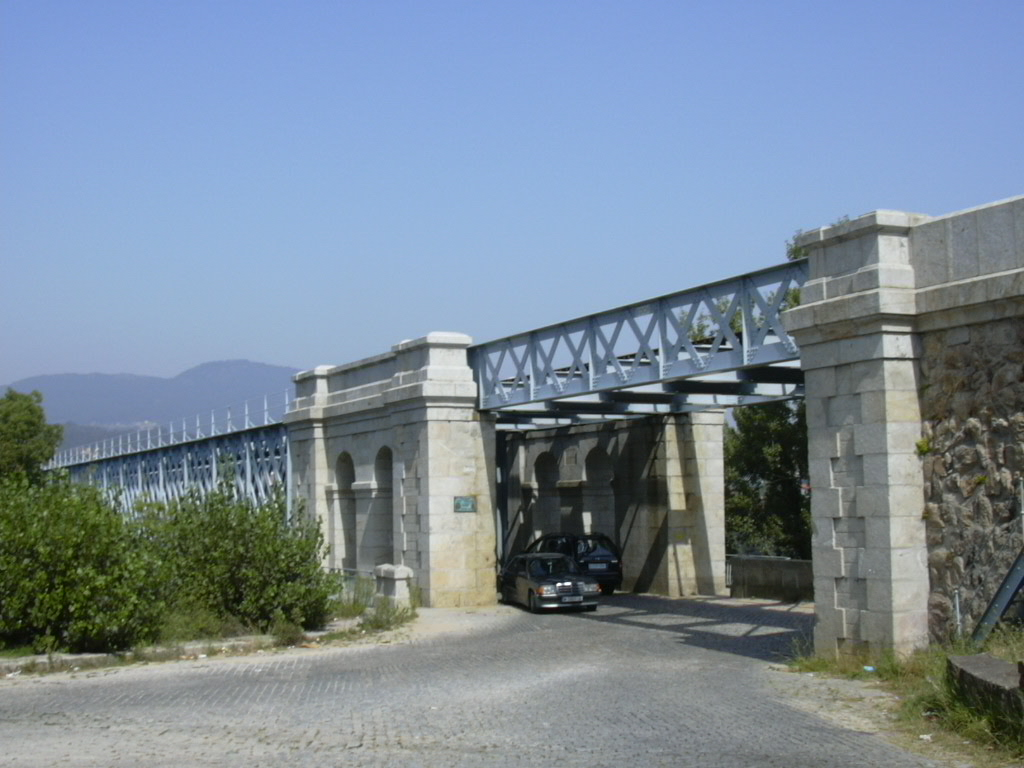 Ponte internacional sobre o Rio Minho, fronteira entre Espanha e Portugal (Tui e Valença do Minho)